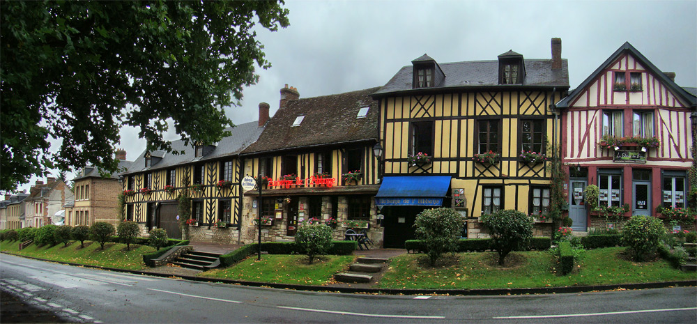 Le Bec-Hellouin, Eure, Normandie, France.